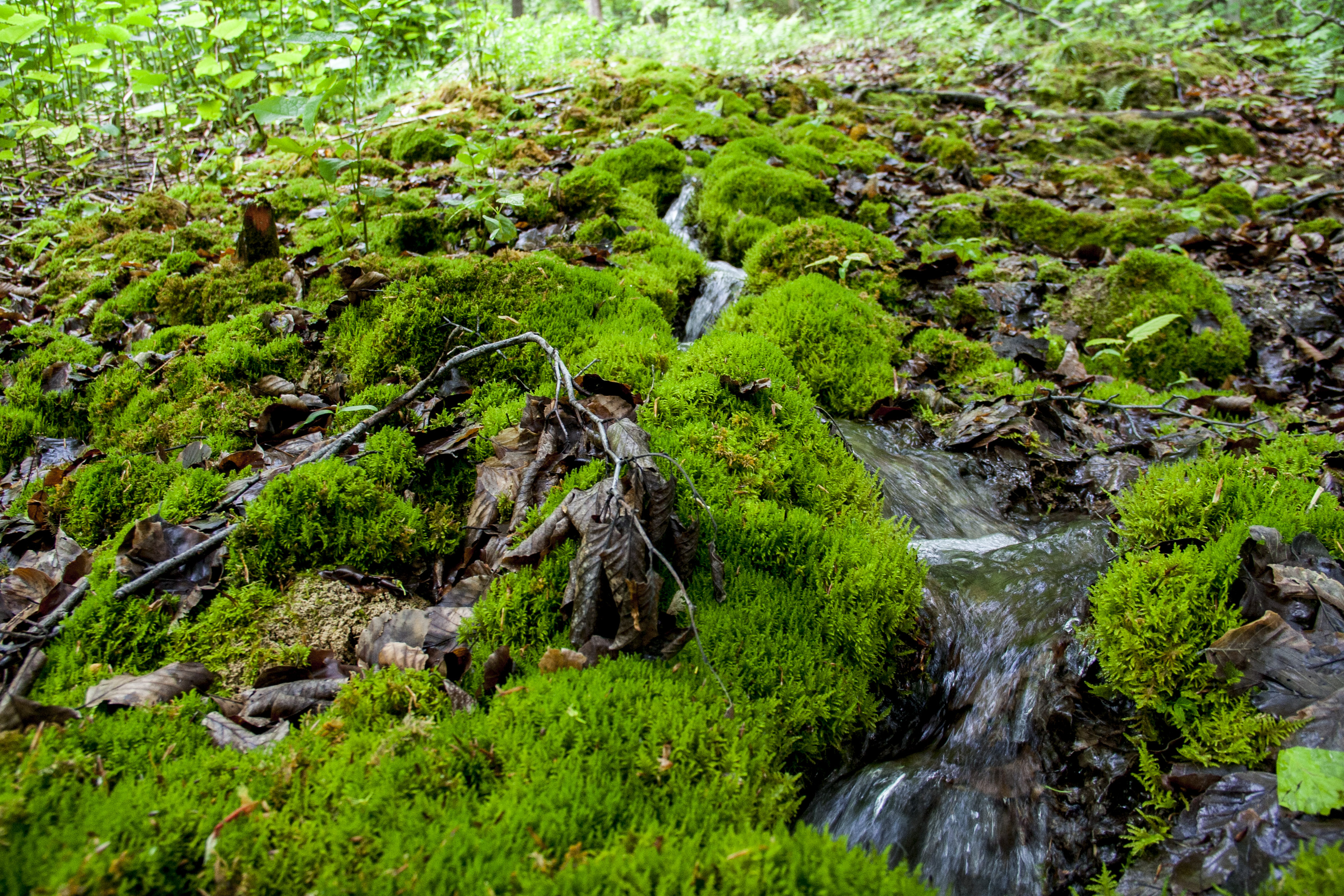 Steinerne Rinne, Thalheim, Happurg, Ausweisung des LSG "Südlicher Jura mit Moritzberg und Umgebung"